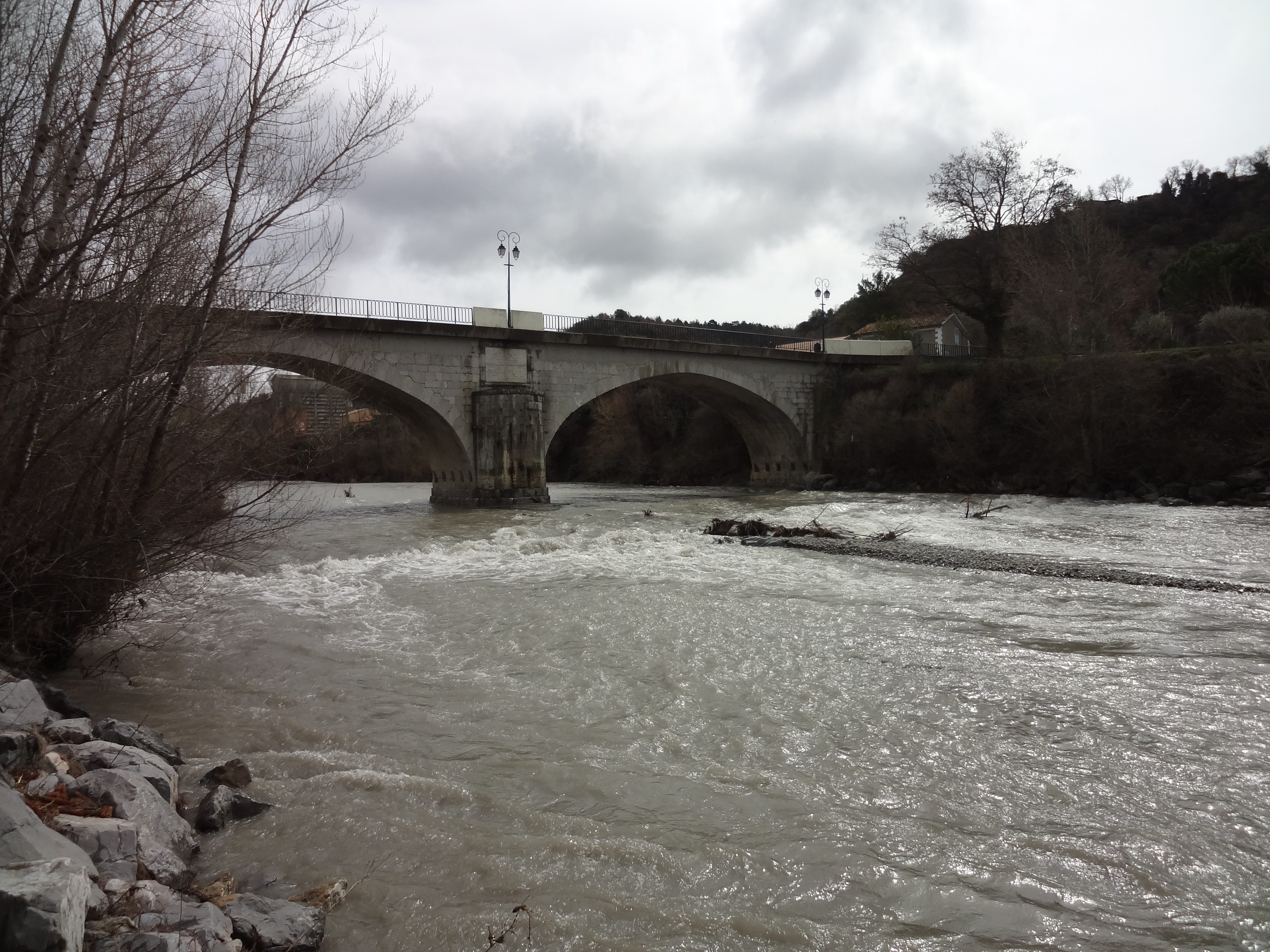 Vieux pont de Malijai sur la Bléone